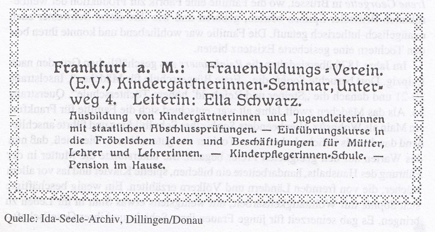 Werbung für Kindergärtnerinnenseminar in Frankfurt